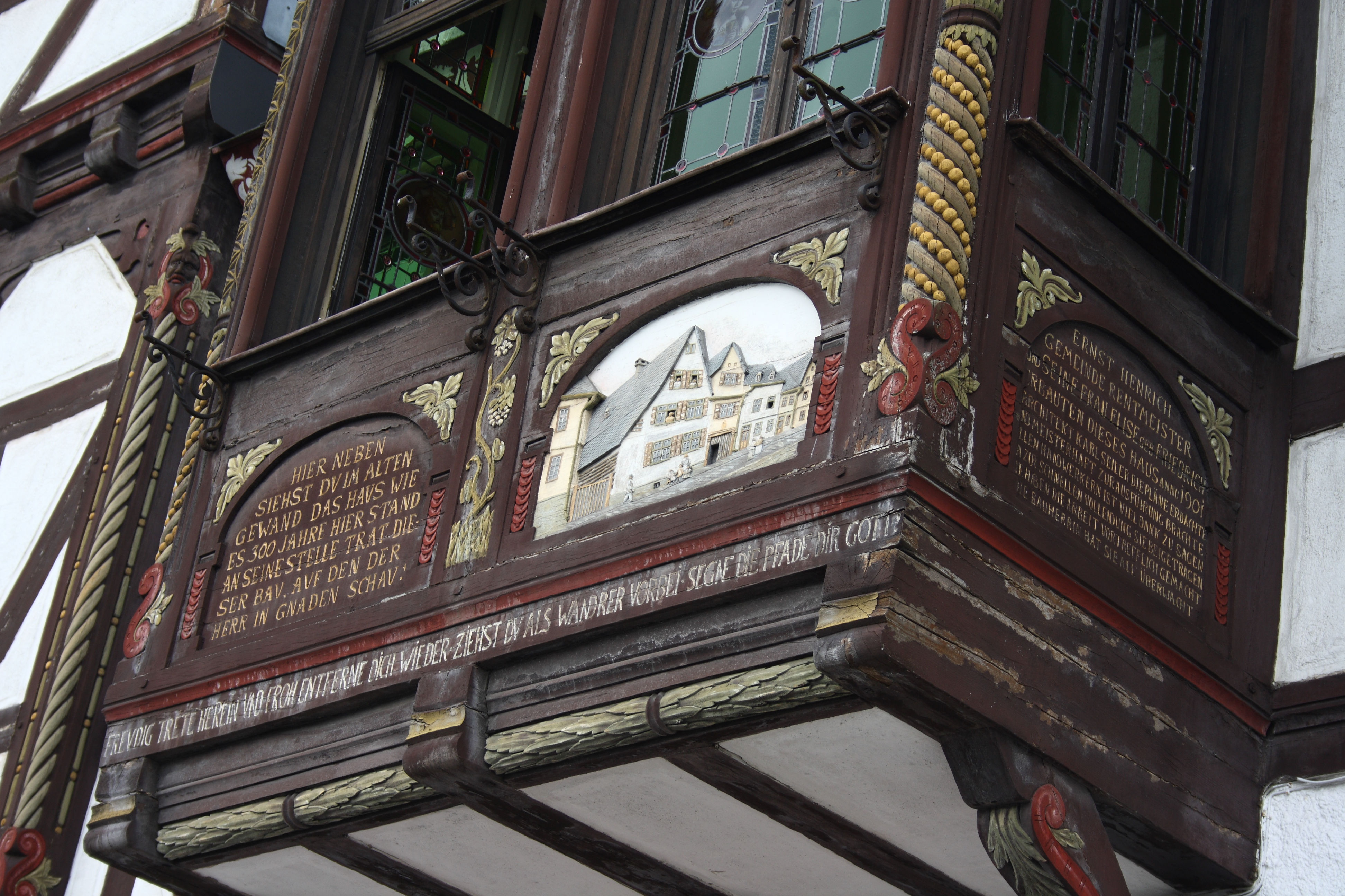 Haus Schütt 5 in Braunfels im Lahn-Dill-Kreis (Hessen)